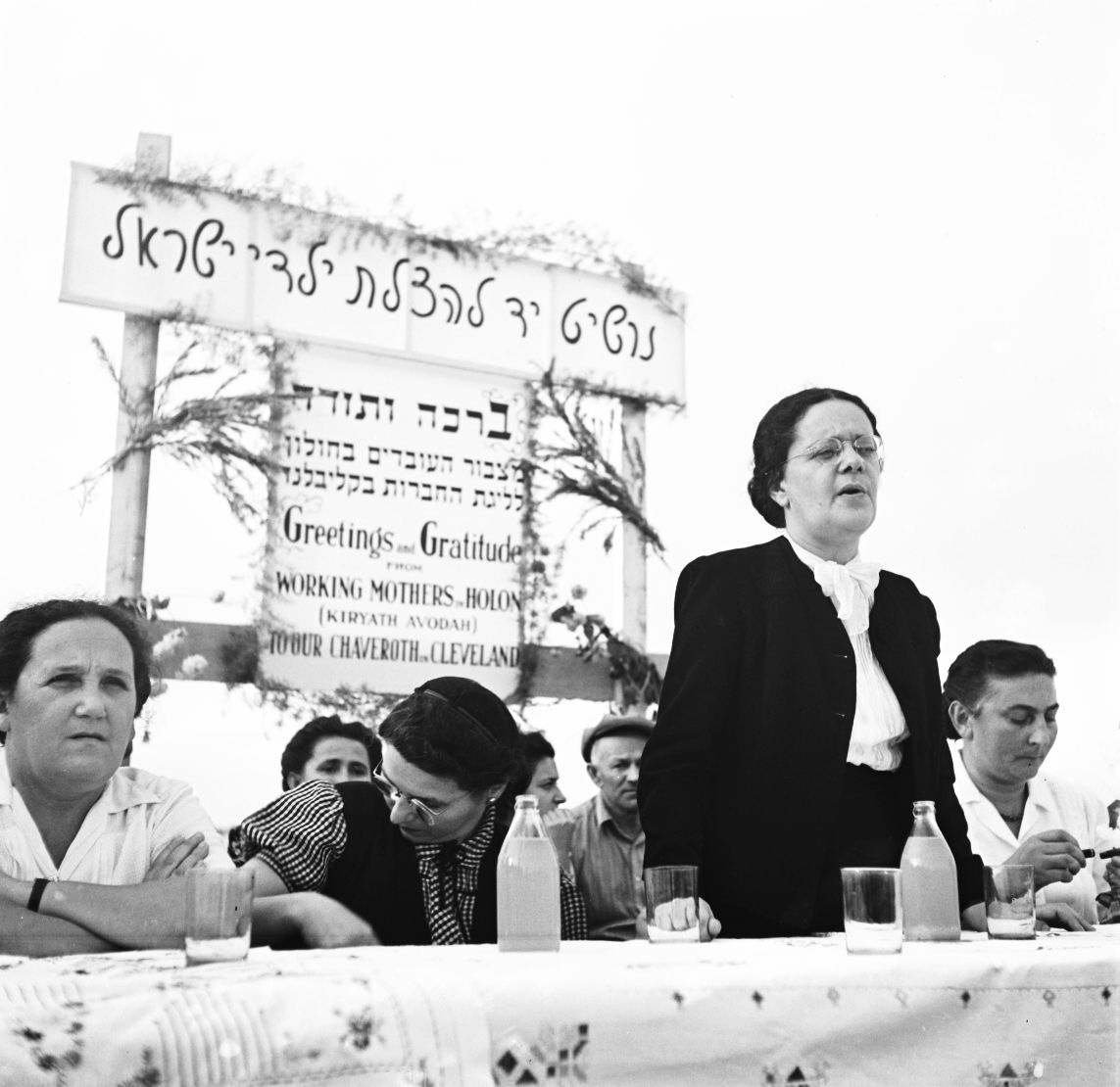 אוסף צילומים של הצלם זולטן קלוגר טווח מספרי התשלילים 30604 - 30641: הנחת אבן הפינה לבית ילדים של מועצת הפועלות, בחולון, 17 בנובמבר 1946, בבה אידלסון שוב נואמת